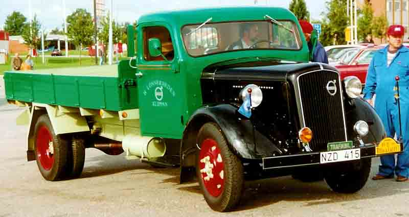 Volvo LV84DT Truck 1937